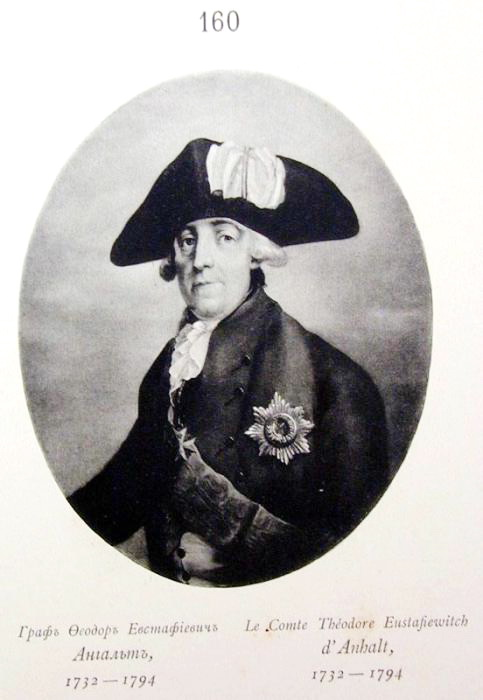 Porträt des Generals Friedrich von Anhalt